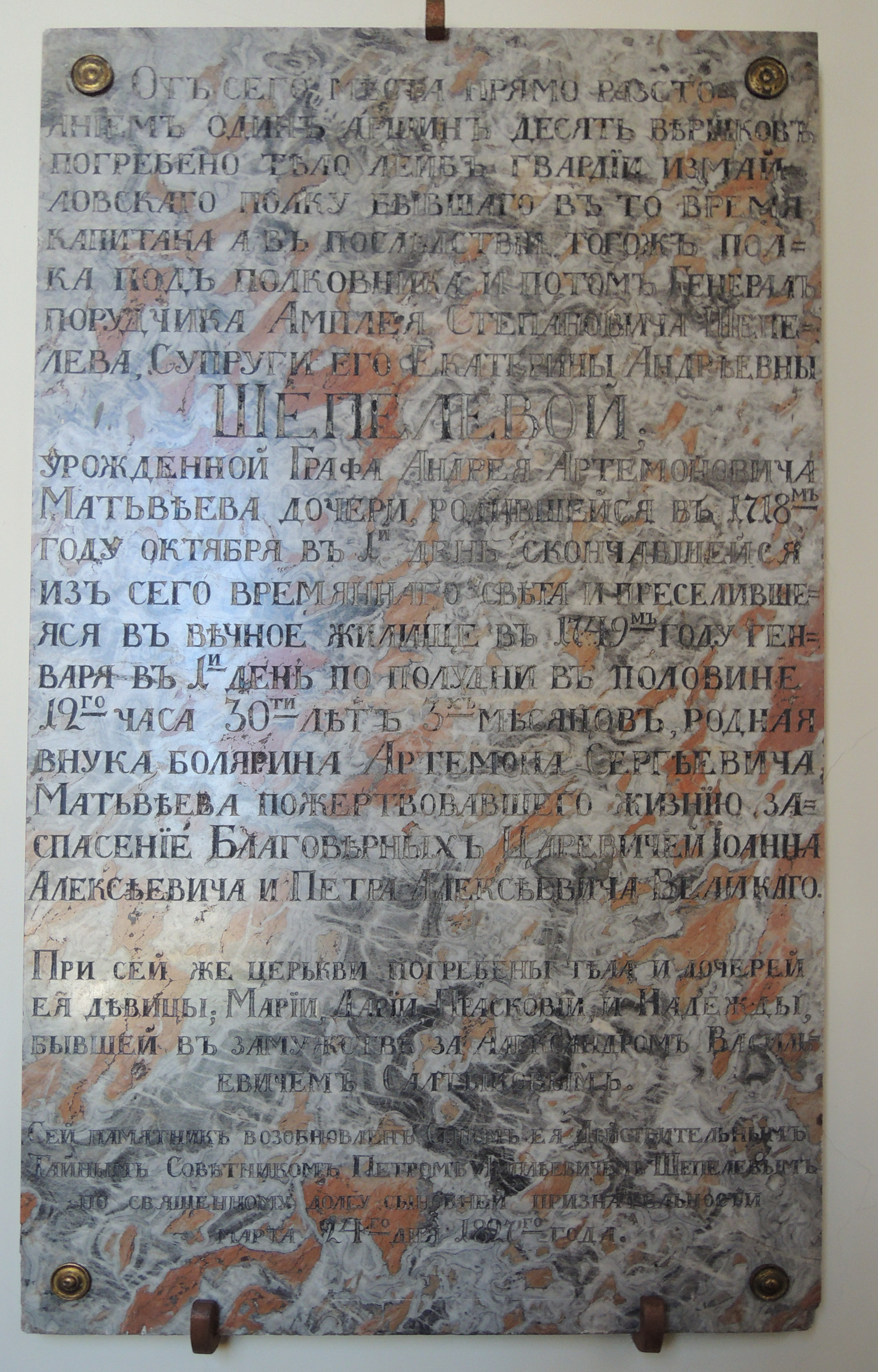 Благовещенскяа церковь Александро-Невской лавры. Шепелева, Екатерина Андреевна, урожд. Матвеева (1718—1749). Дочь дипломата А. А. Матвеева, жена полковника Измайловского полка А. С. Шепелева, приближенная имп. Елизаветы Петровны. Плита с эпитафией. Неизв. мастер, 1827 г. Перенесена из Крестовоздвиженской Ямской церкви.